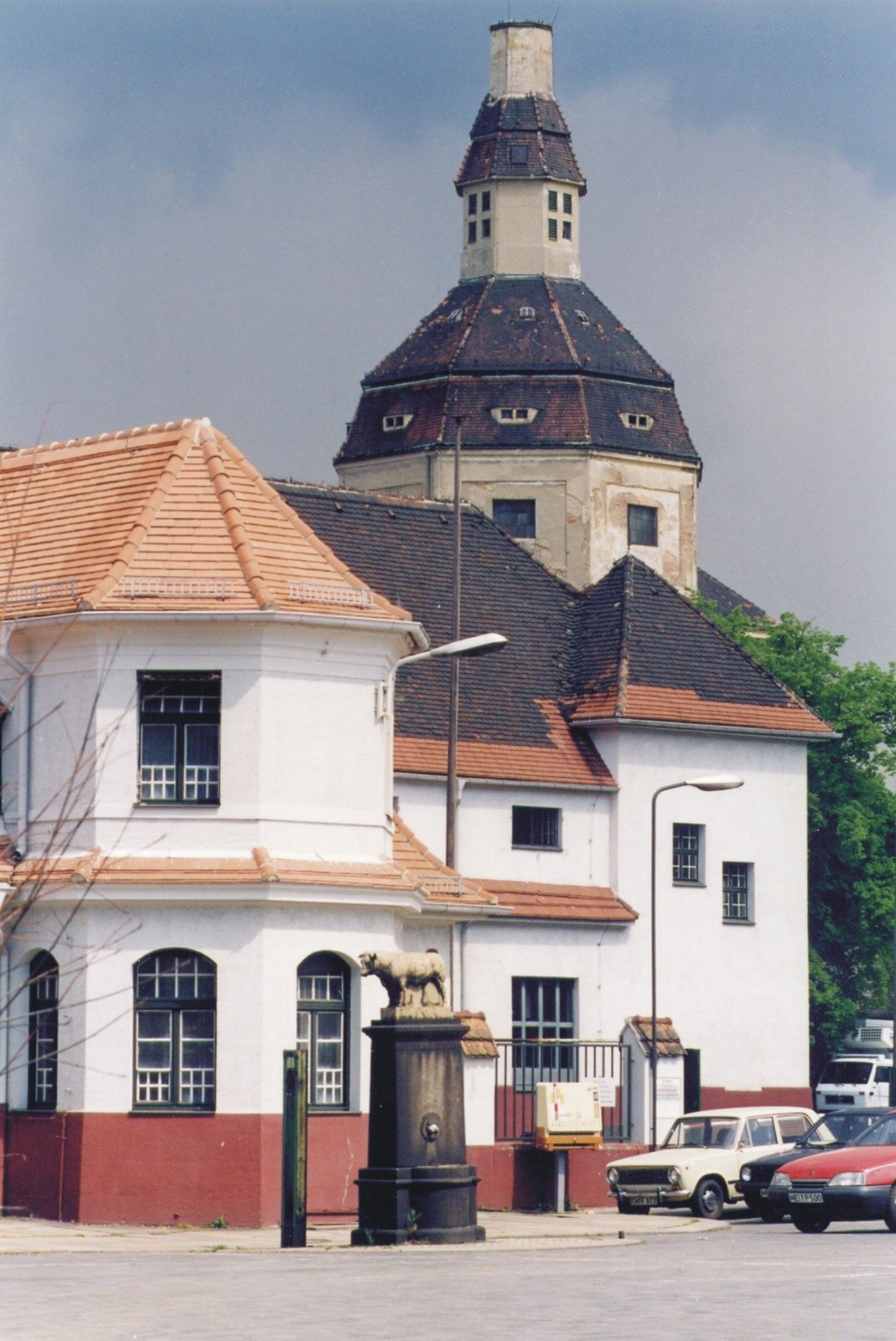 Dresdner Schlachthof im Ostragehege, ehemaliger Haupteingang